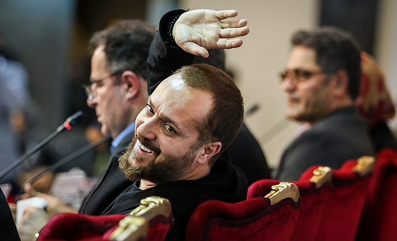 احمد مهران‌فر بازیگر در نشست خبری فیلم خجالت نکش - سی‌وششمین جشنواره فیلم فجر